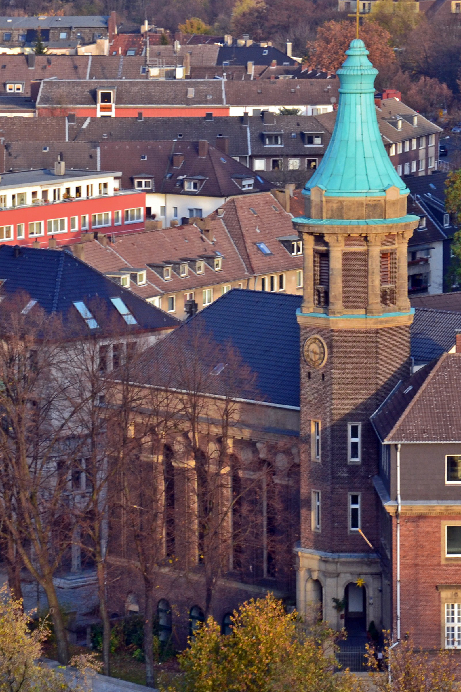 Altkatholische Friedenskirche in der Essener Innenstadt, Ansicht von Westen